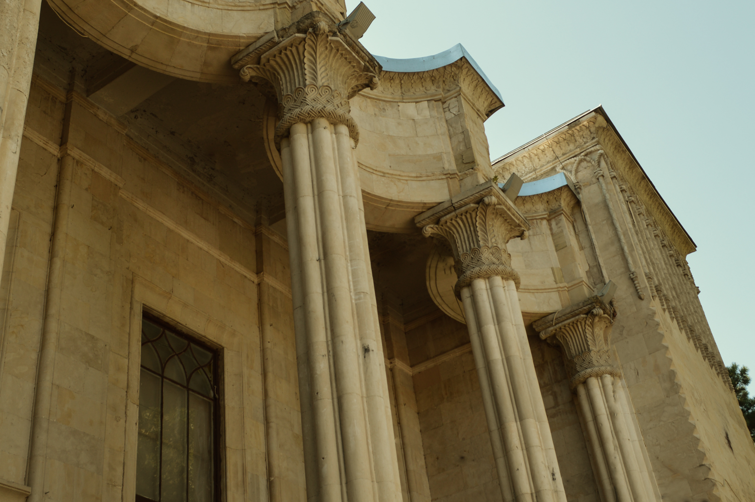 გორის გიორგი ერისთავის სახელმწიფო პროფესიული დრამატული თეატრის შენობა 2016 წელი.